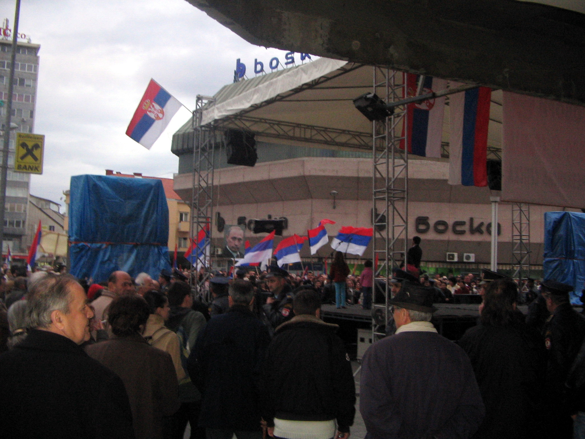 Protest v Banja Luce proti prohlášení nezávislosti Kosova několik týdnů po faktickém aktu